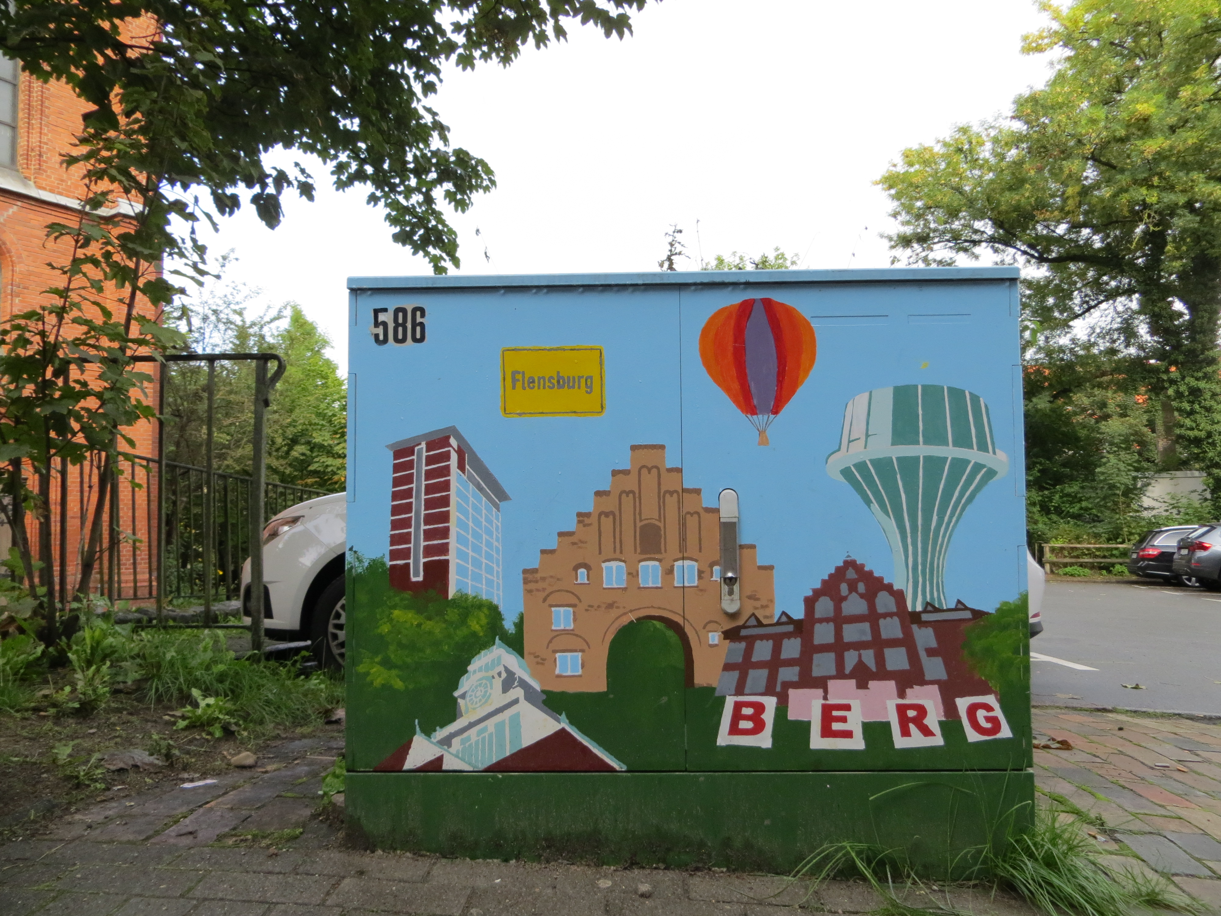 Stromkasten Nr 586, Nordergraben, Mit Flensburg-Motiven Nordetor, Rathaus, Wasserturm, Auguste-Viktoria-Schule sowie eine Maus, Bild 1; gleich bei der kath. Kirche; gem. Zeitungsartikel von den Schülerinnen Malin (12) und Anica (10) die bei der Preisverleihung für die schönsten Stromkästen 2012 gewonnen hatten; es gab wohl noch weitere Gewinner